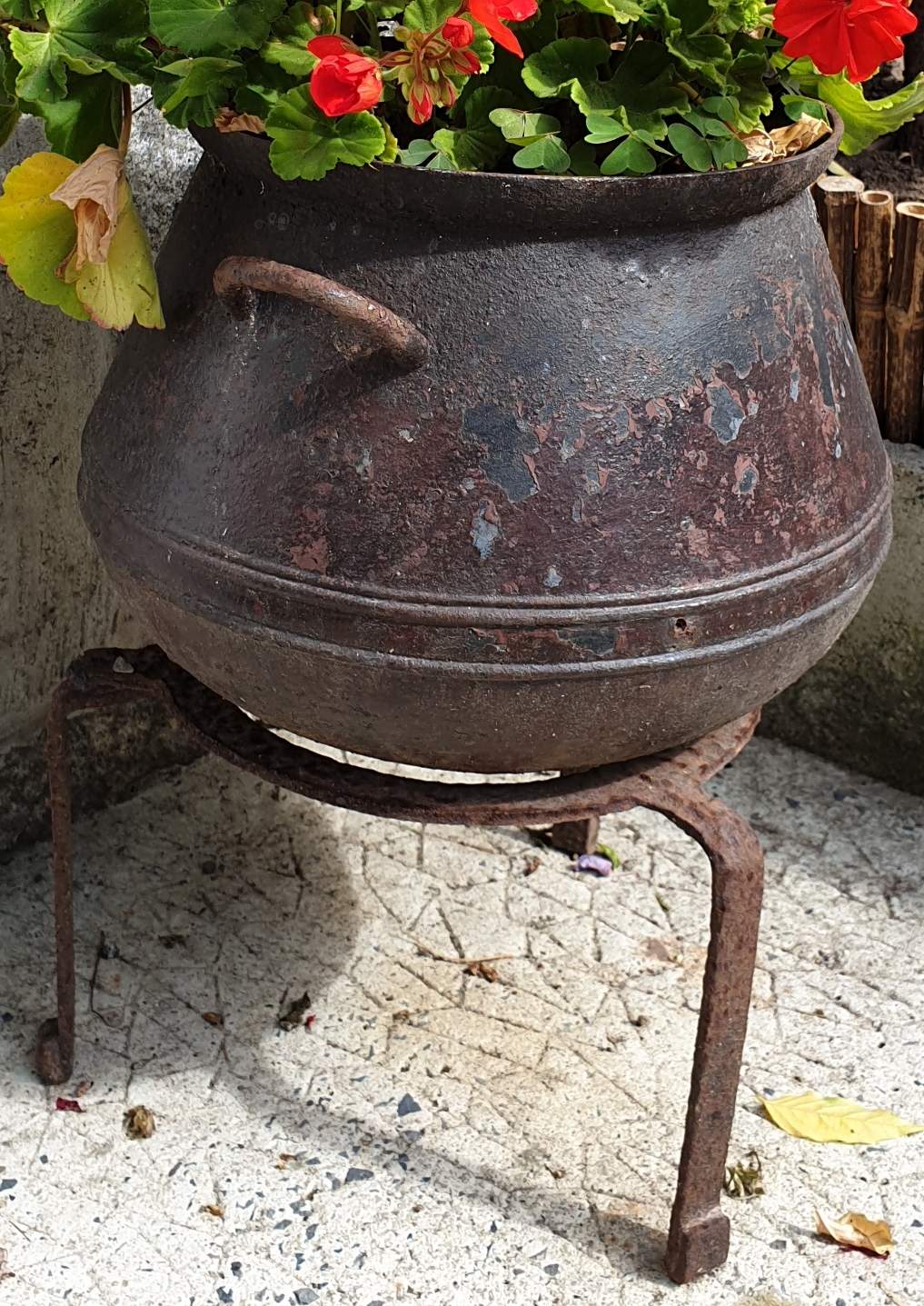 Marmite en fonte à deux poignées, du type courant appelé "pot du Hainaut", en fabrication en France de la fin du XIXe siècle au début du XXe. Posé sur trépied de fer forgé. Photographié en Normandie.